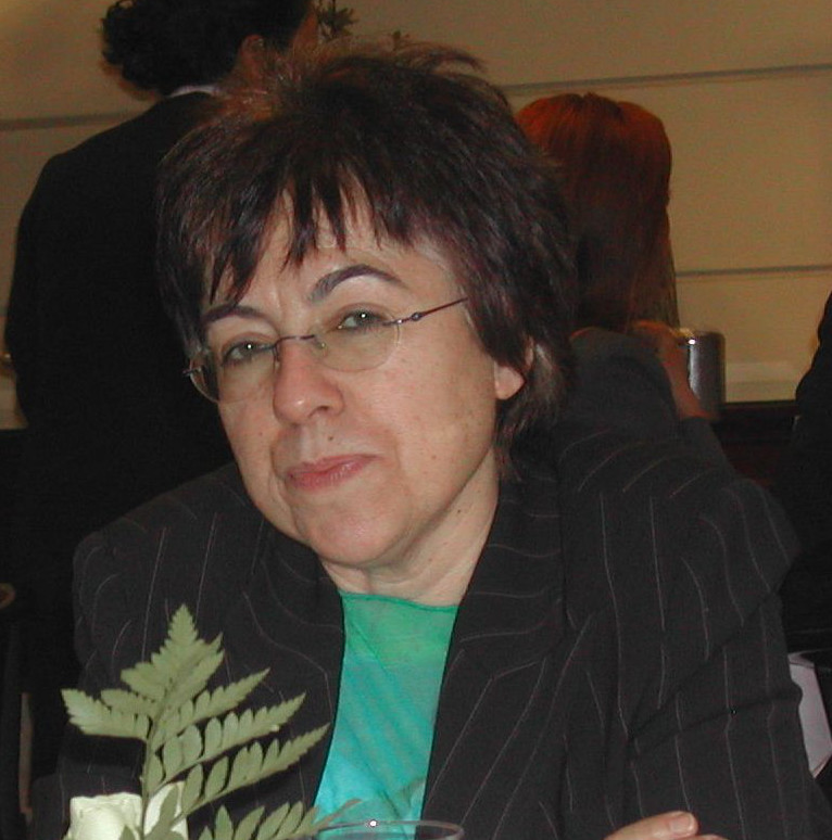 Fotografía tomada durante la reunión celebrada en el Senado de senadoras y diputadas de la Legislatura Constituyente